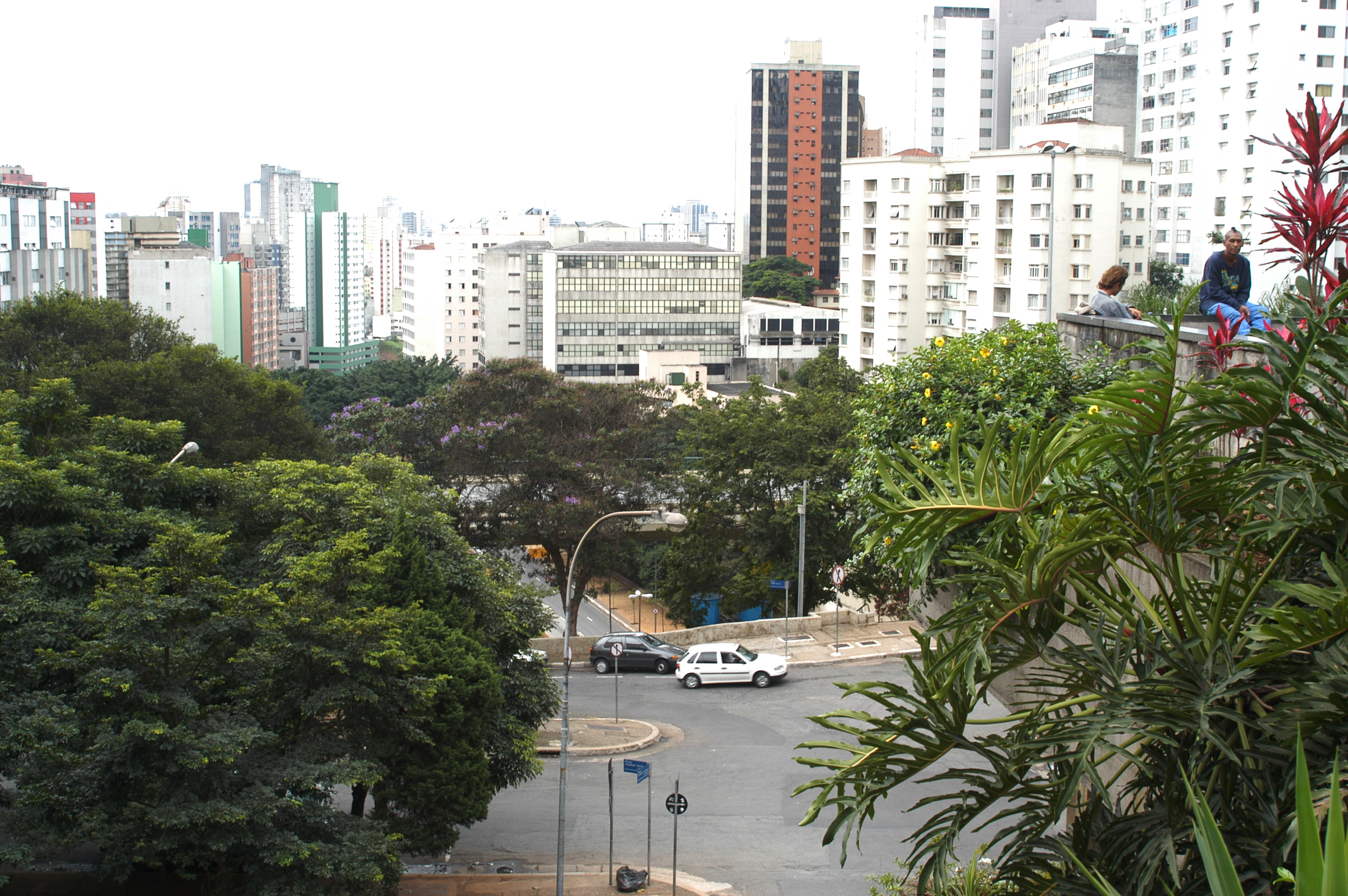 fotografia tirada do MASP para as ruas que ficam atrás dele